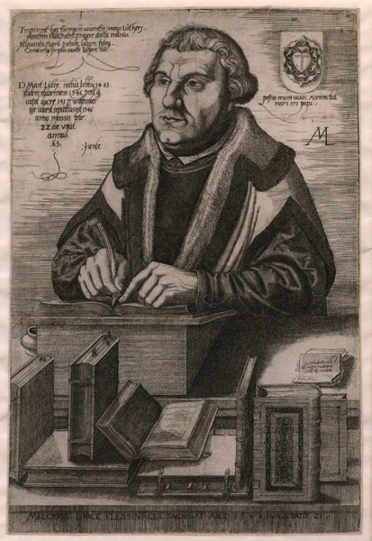 Melchior Lorck (1527-1626), Portræt af Martin Luther, 1548